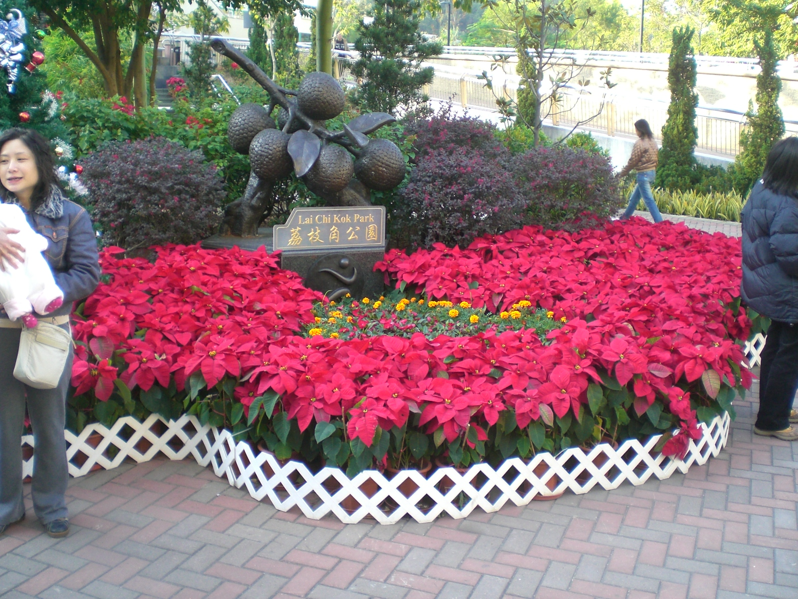 荔枝角公園 Lai Chi Kok Park